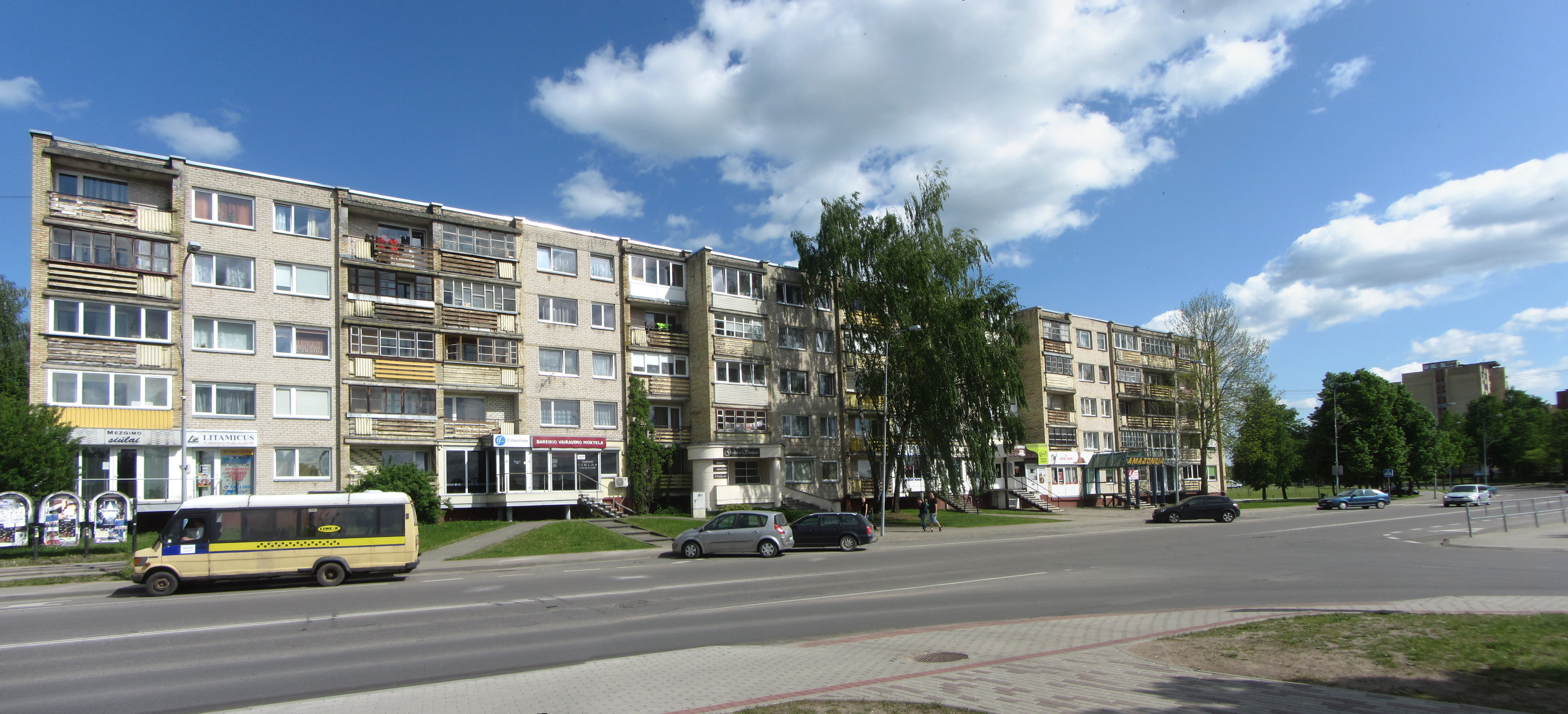 Utena, Lithuania